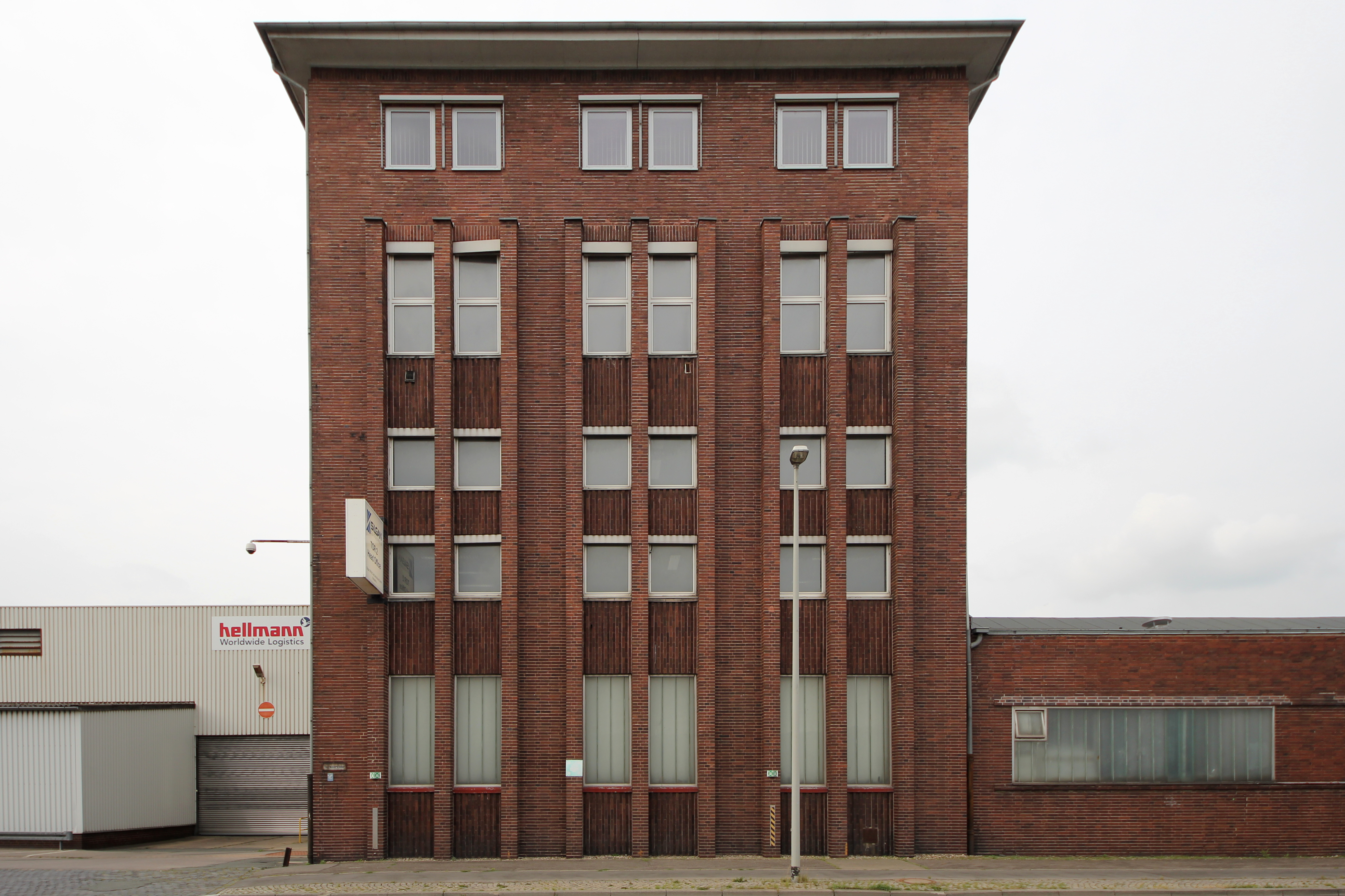 Ein Gebäude der Firma Silgan White Cap/Silgan Closures in der Hansastraße in Hannover.